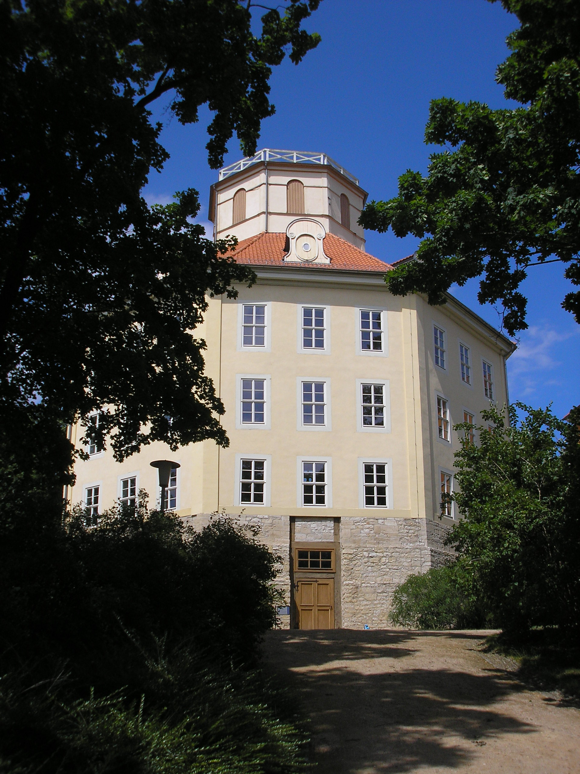 Das Achteckhaus des Schlosses in Sondershausen (Thüringen).